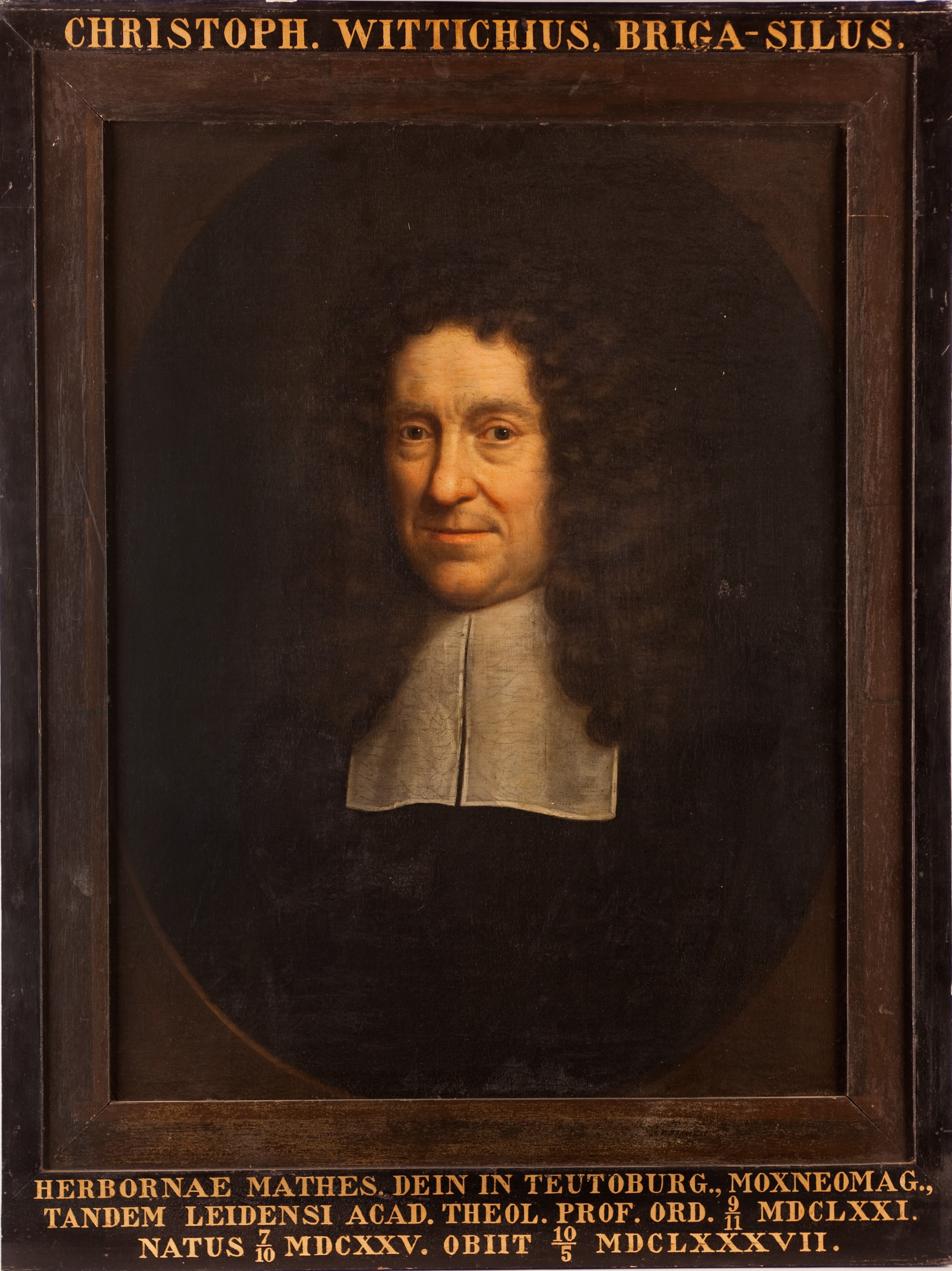 Leids hooglerarenportret van Christophorus Wittichius. Icones Leidenses 99